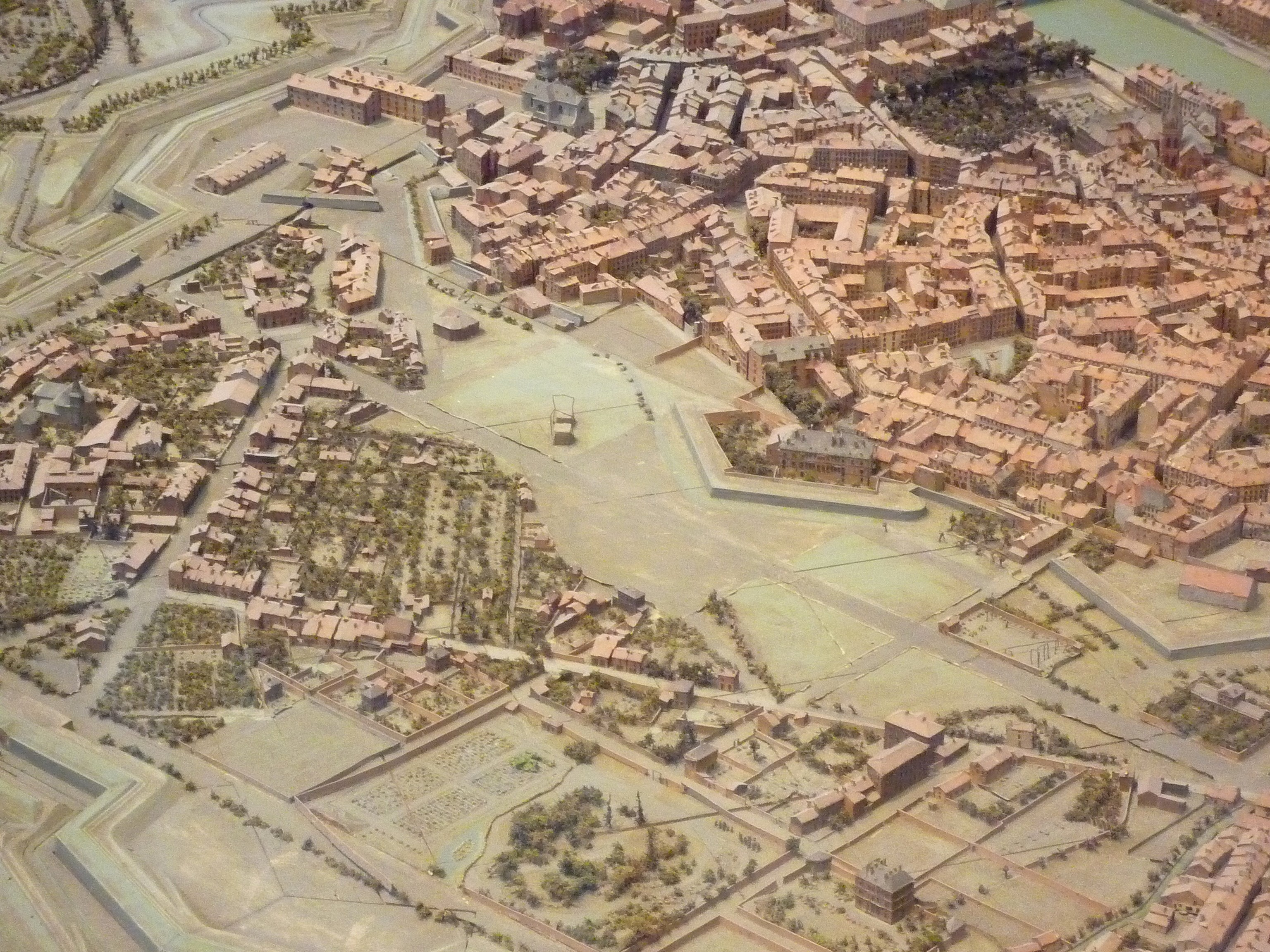 Plan-relief de Grenoble (1848). - Détail de la place d'Armes au centre, future place de Verdun.